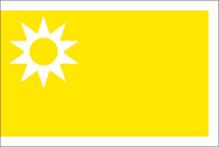 Summary Drapeau de la principauté de Faridkot possible que le disque central ne soit pas de la bonne taille et que le jaune ne soit aps OK Source Nataraja Statut Nataraja Catégorie:Drapeau de principauté des Indes